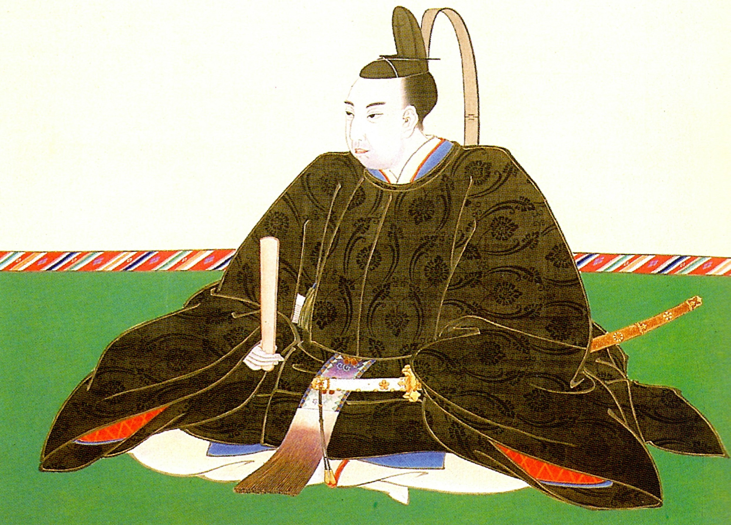 前田斉広の肖像。